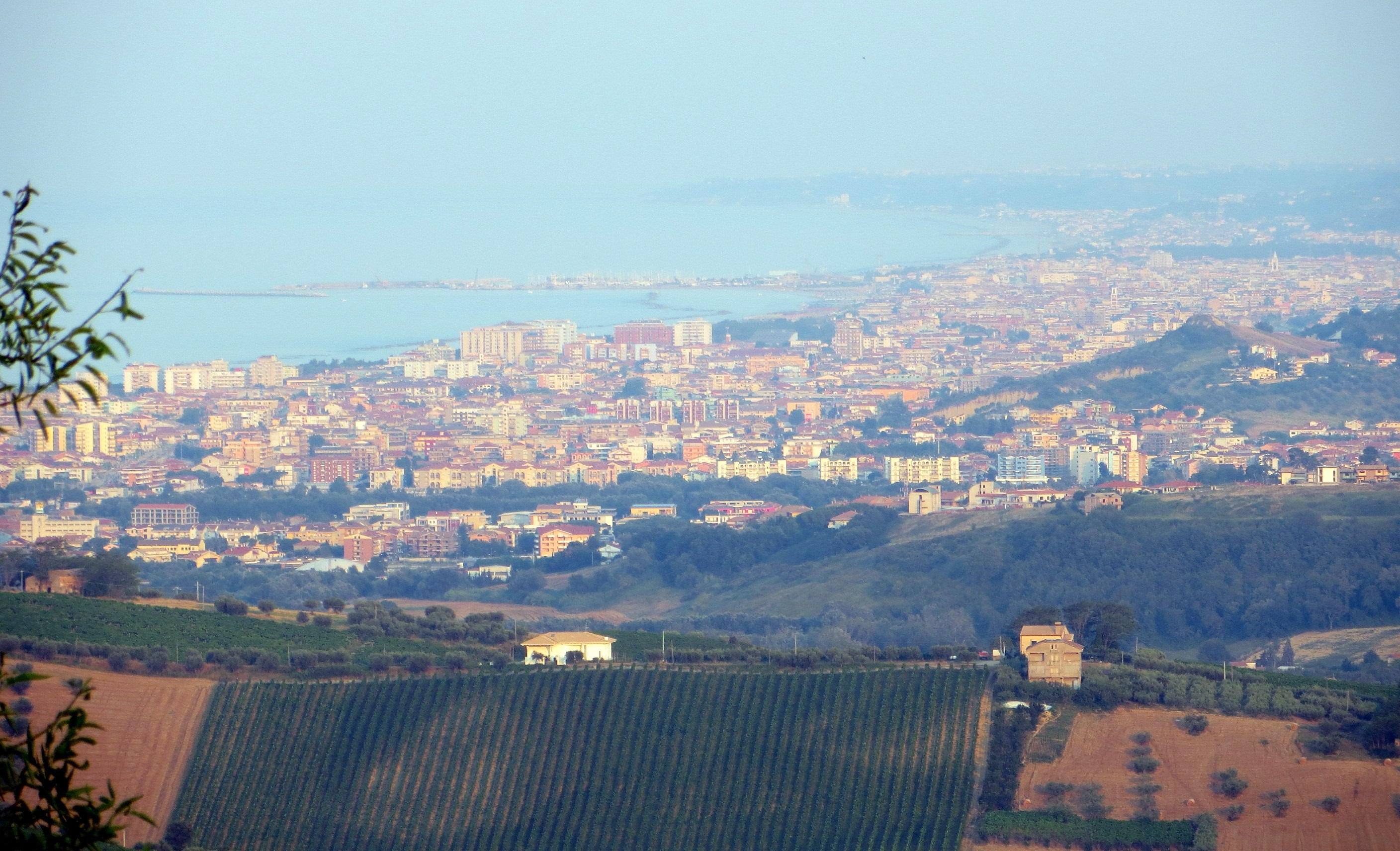 Veduta di Montesilvano e Pescara dalla frazione di Silvi, Pianacce